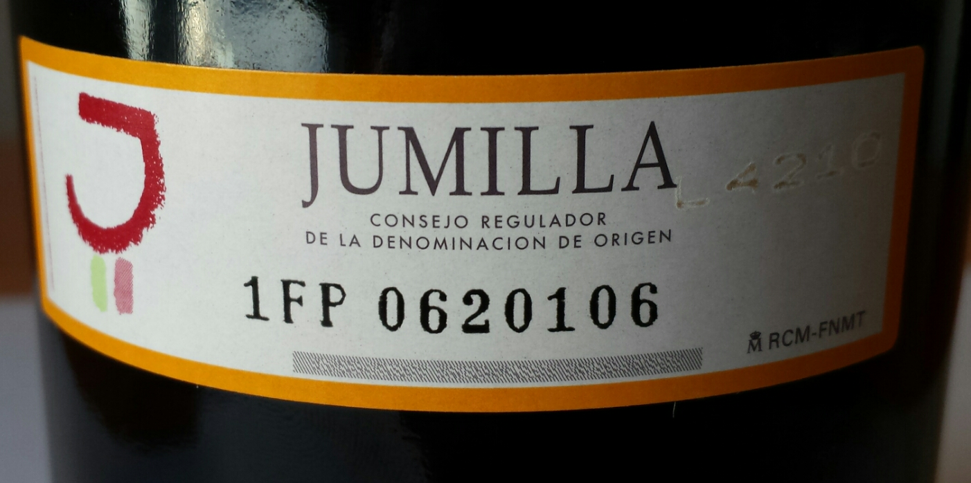 Etiqueta de la DO Jumilla, Murcia y Albacete, España.